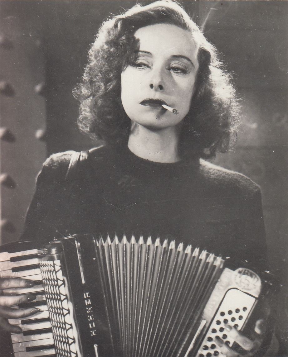 Muráti Lili az "Éjszaka lánya" című filmben. Postcard.